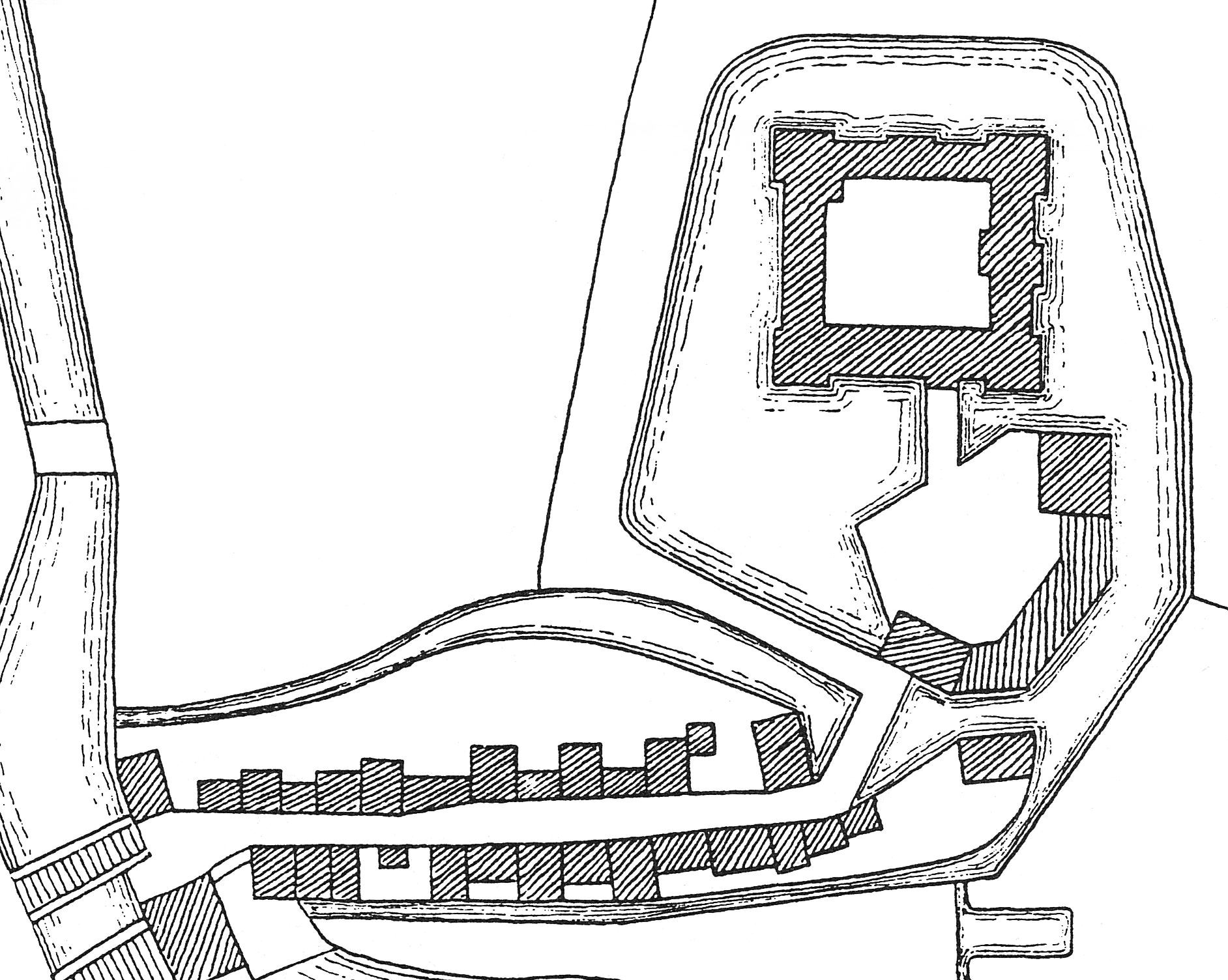 Lageplan des Schlosses Horst nach einer Katasterkarte aus dem Jahr 1768